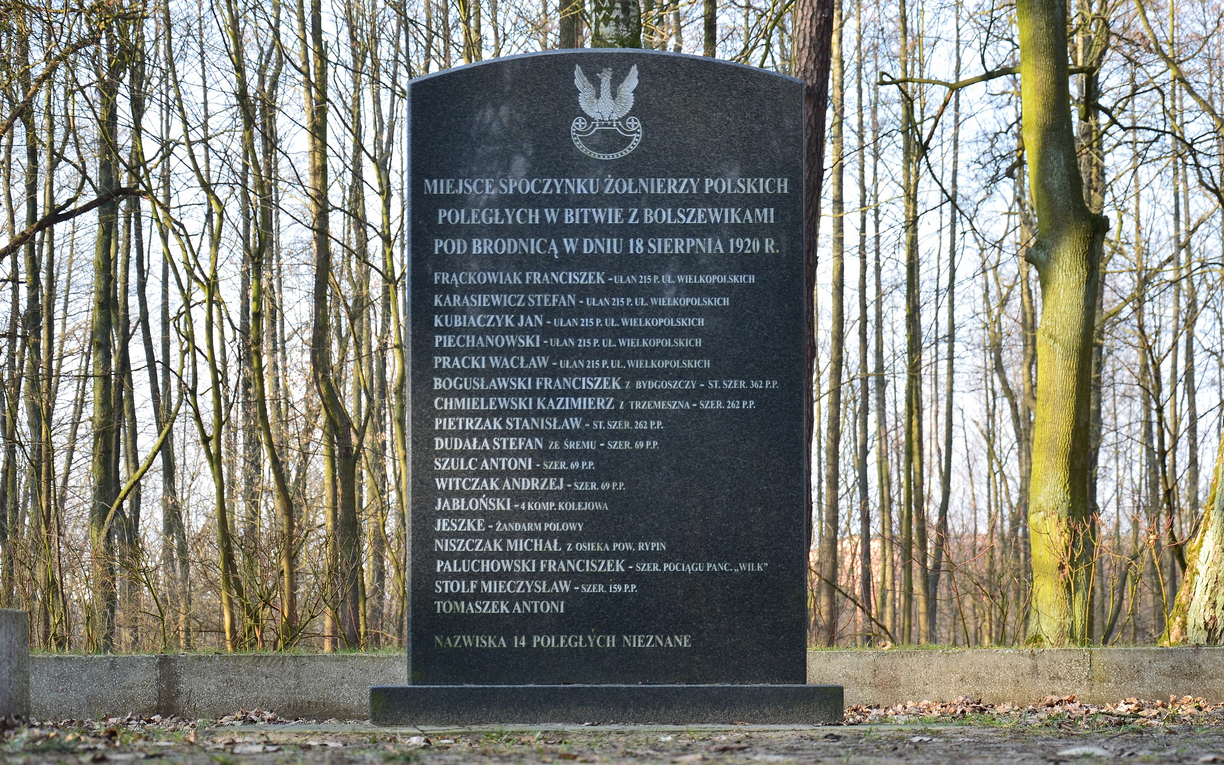 Cmentarz wojskowy w Brodnicy